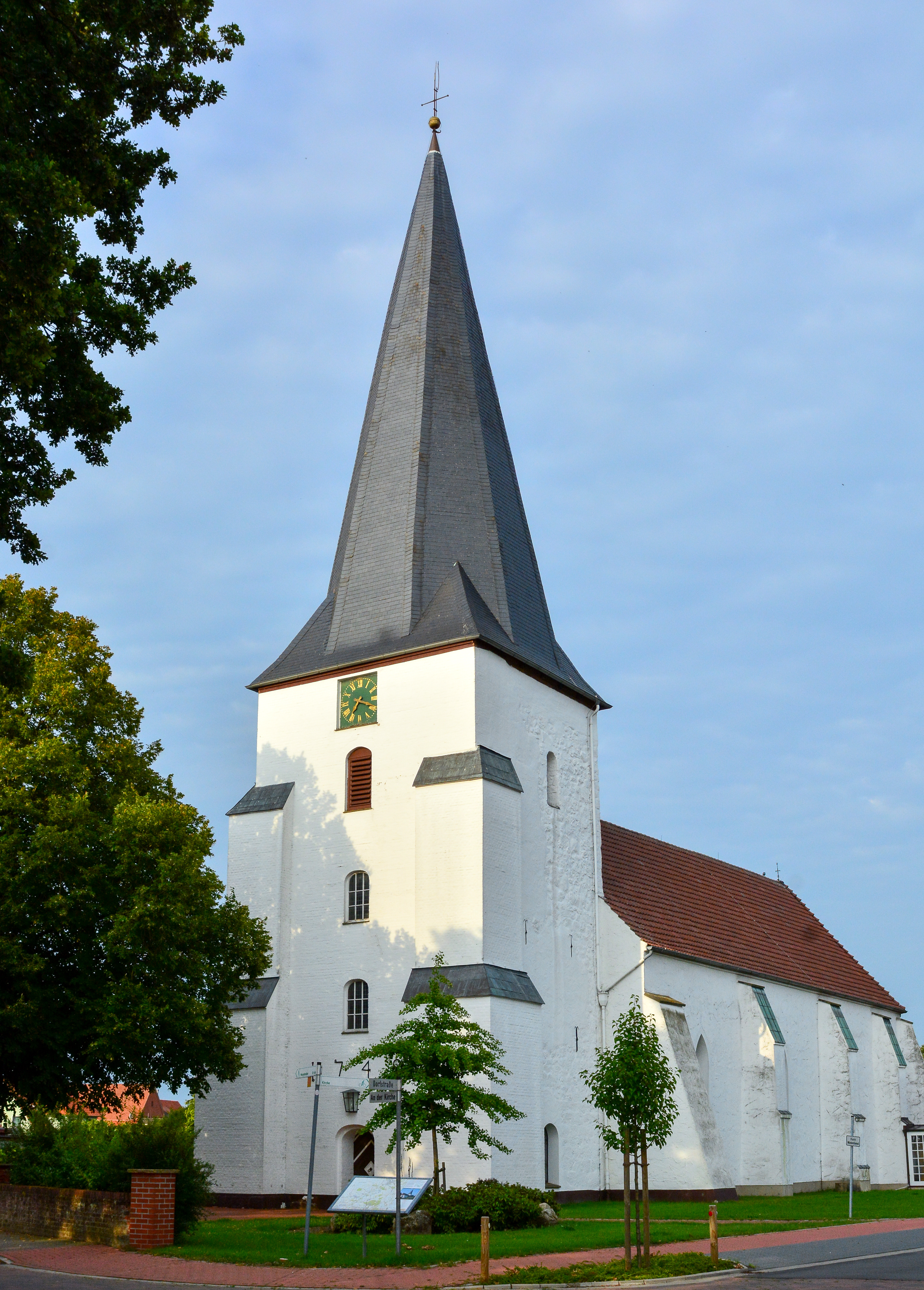 Jacobidrebber - die St. Jacobikriche